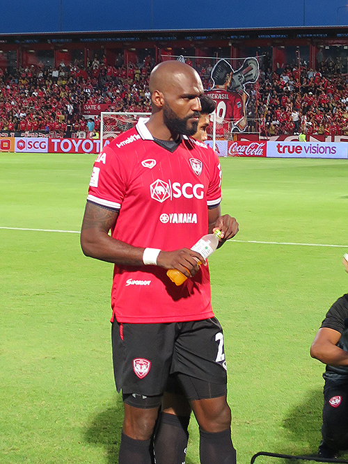 Célio Ferreira dos Santos